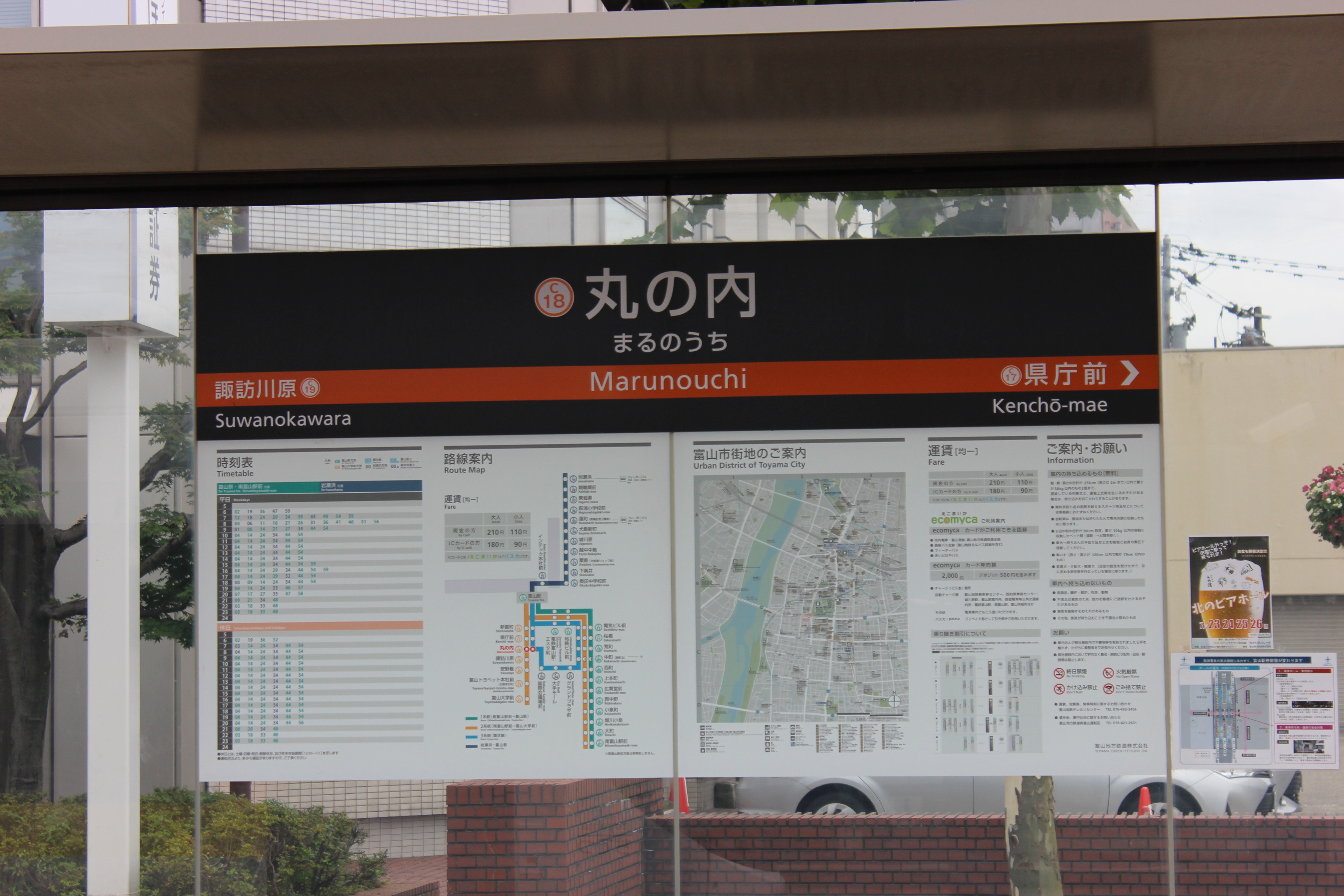 丸の内停留場の駅名標